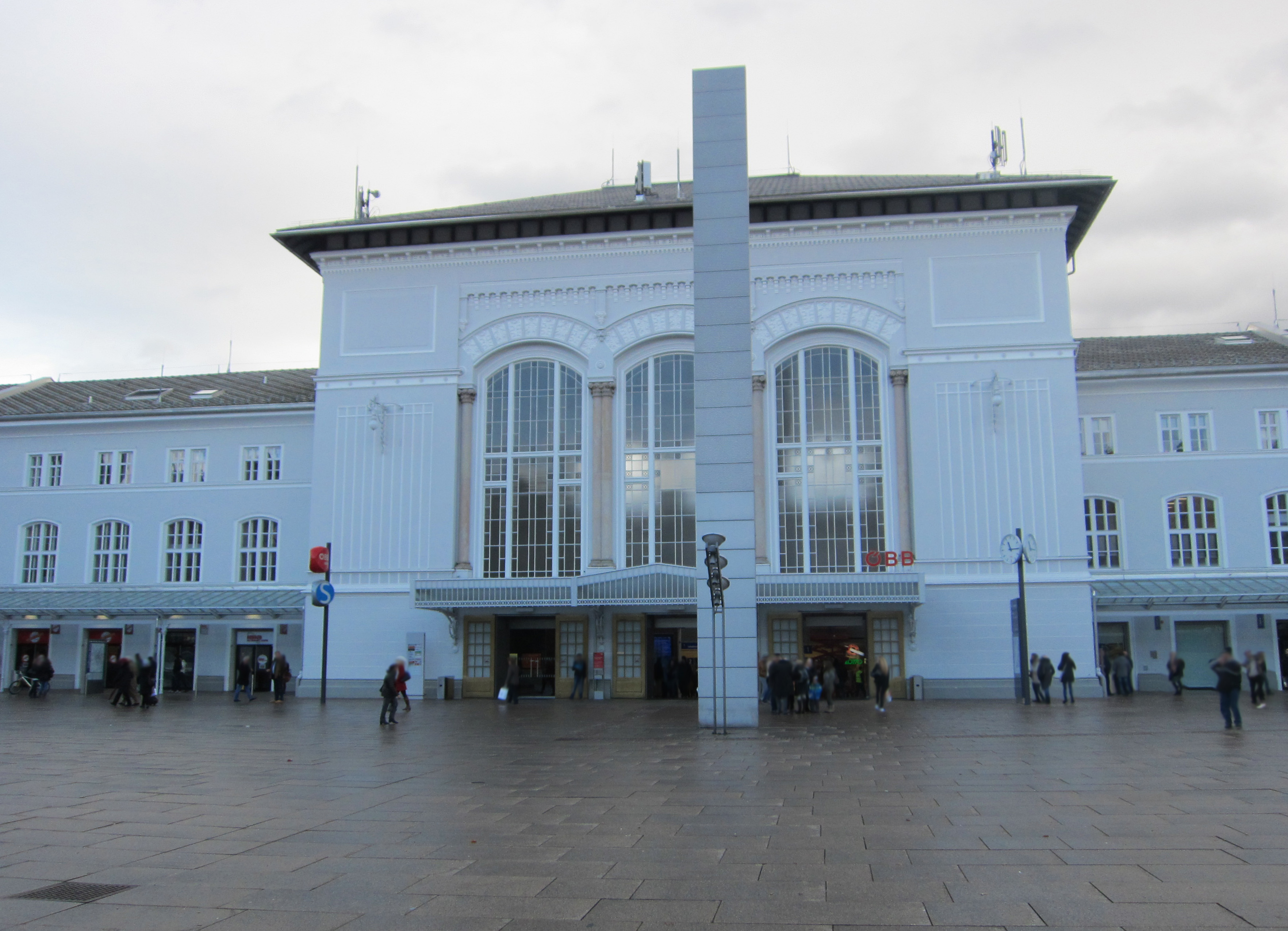 Das Bahnhofsgebäude nach der Renovierung im Jahre 2014